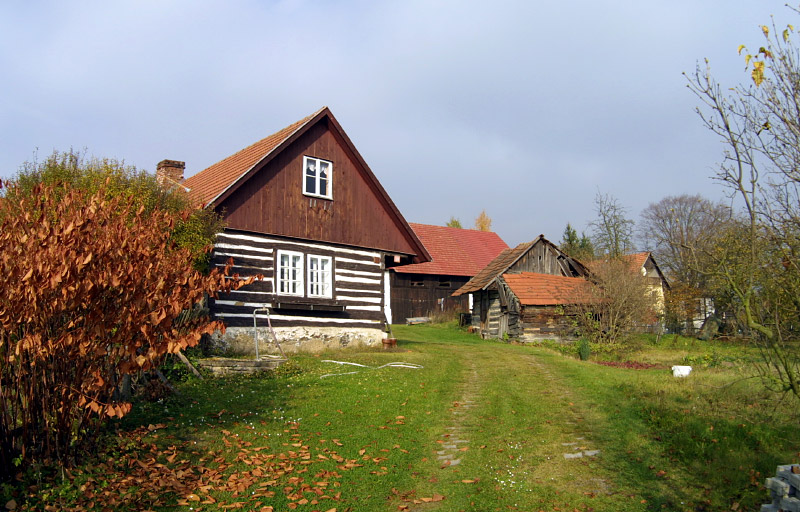 Roubenka v čp. 20 v Lhotě u Chříče, kulturní památka.